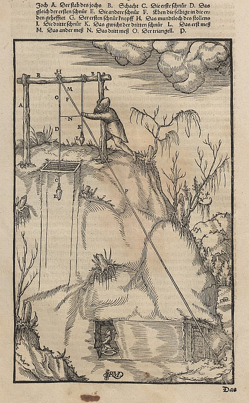 Original image description from the Deutsche Fotothek Bergwerk & Bergbau & Markscheider & Vermessung